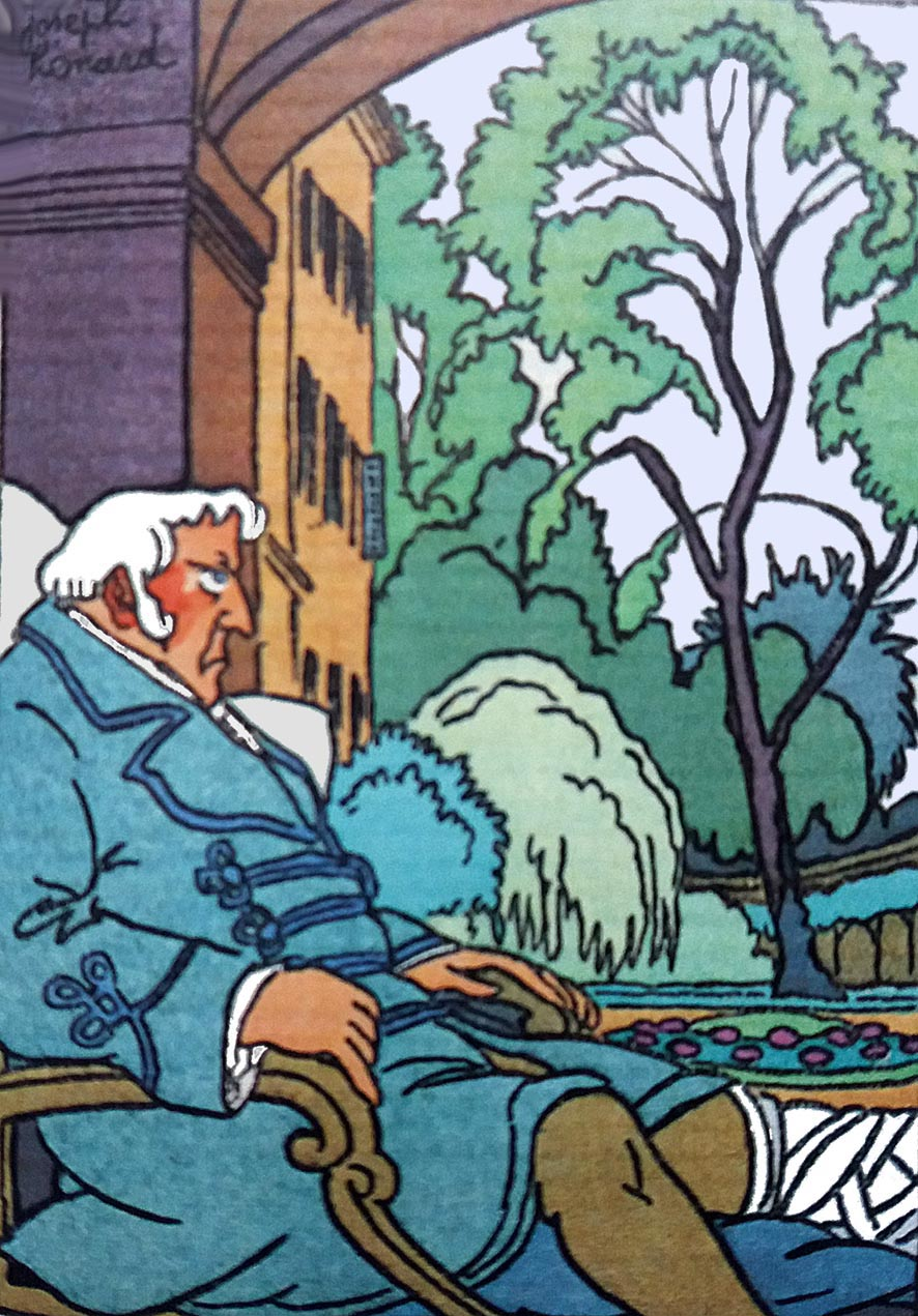 Dodin Bouffant en cure à Baden Baden pour y soigner sa goutte